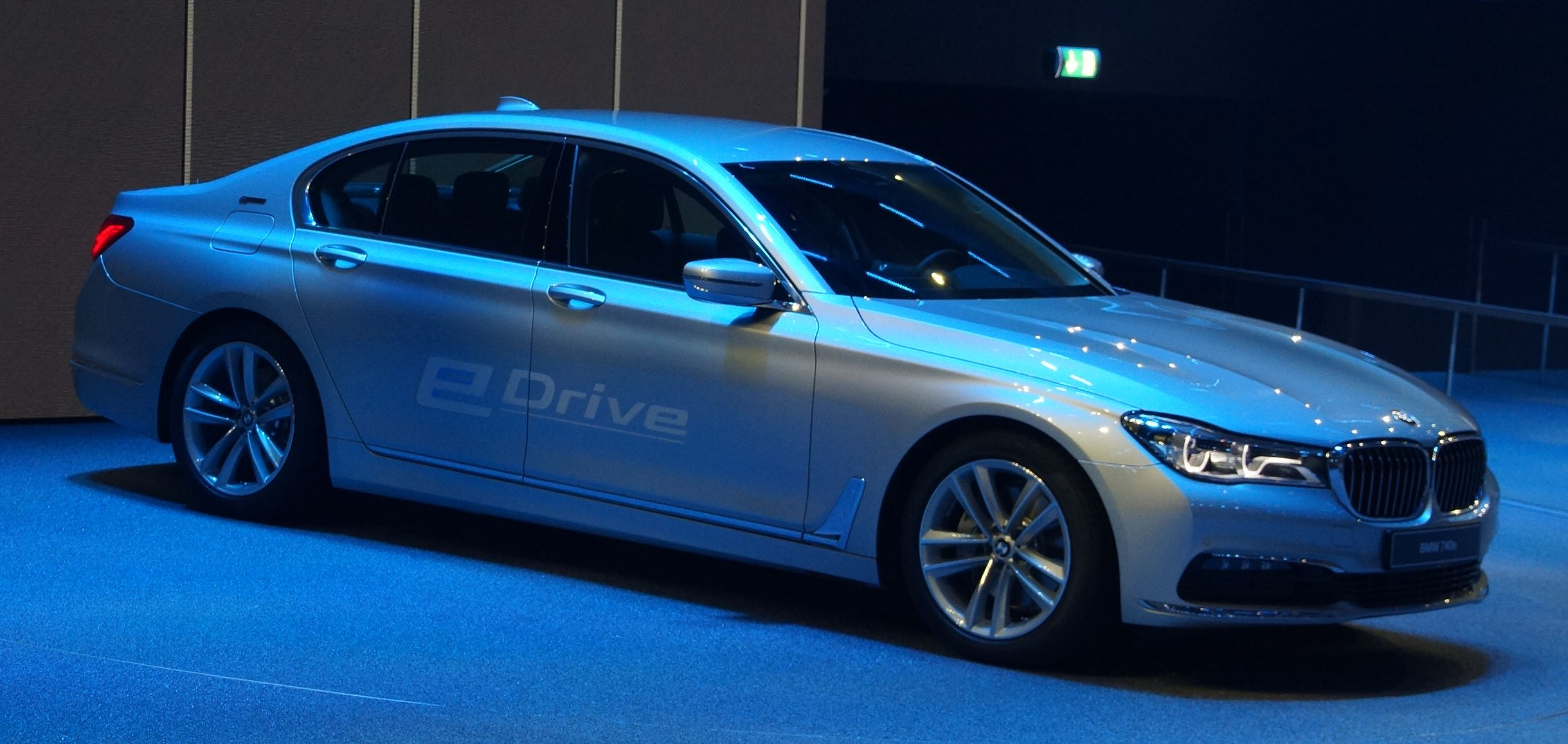 7er BMW eDrive auf der IAA 2015